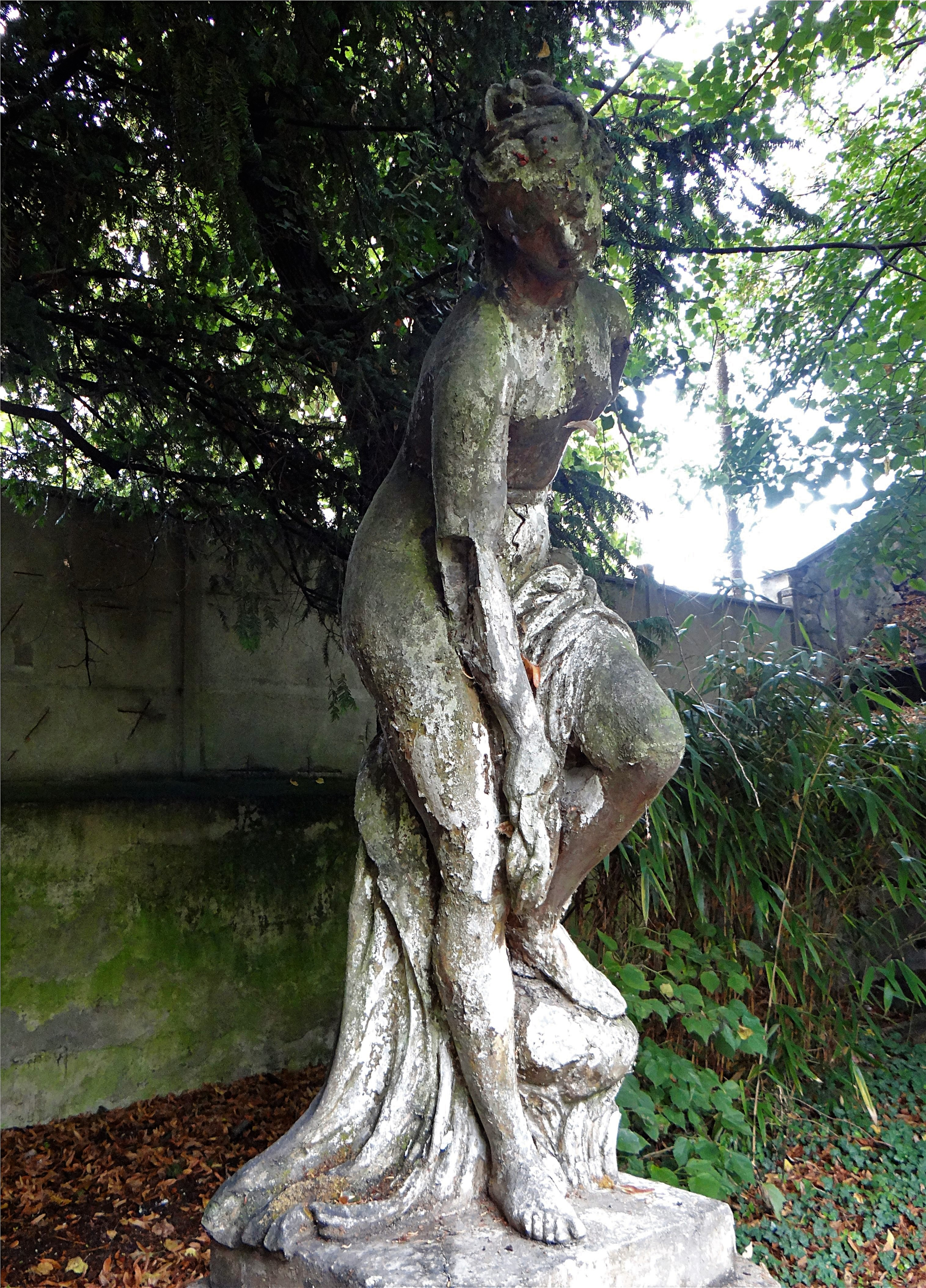 Dans le jardin de la Villa Max, Chelles, Seine et Marne, France. Statue de Vénus ou Diane au bain.